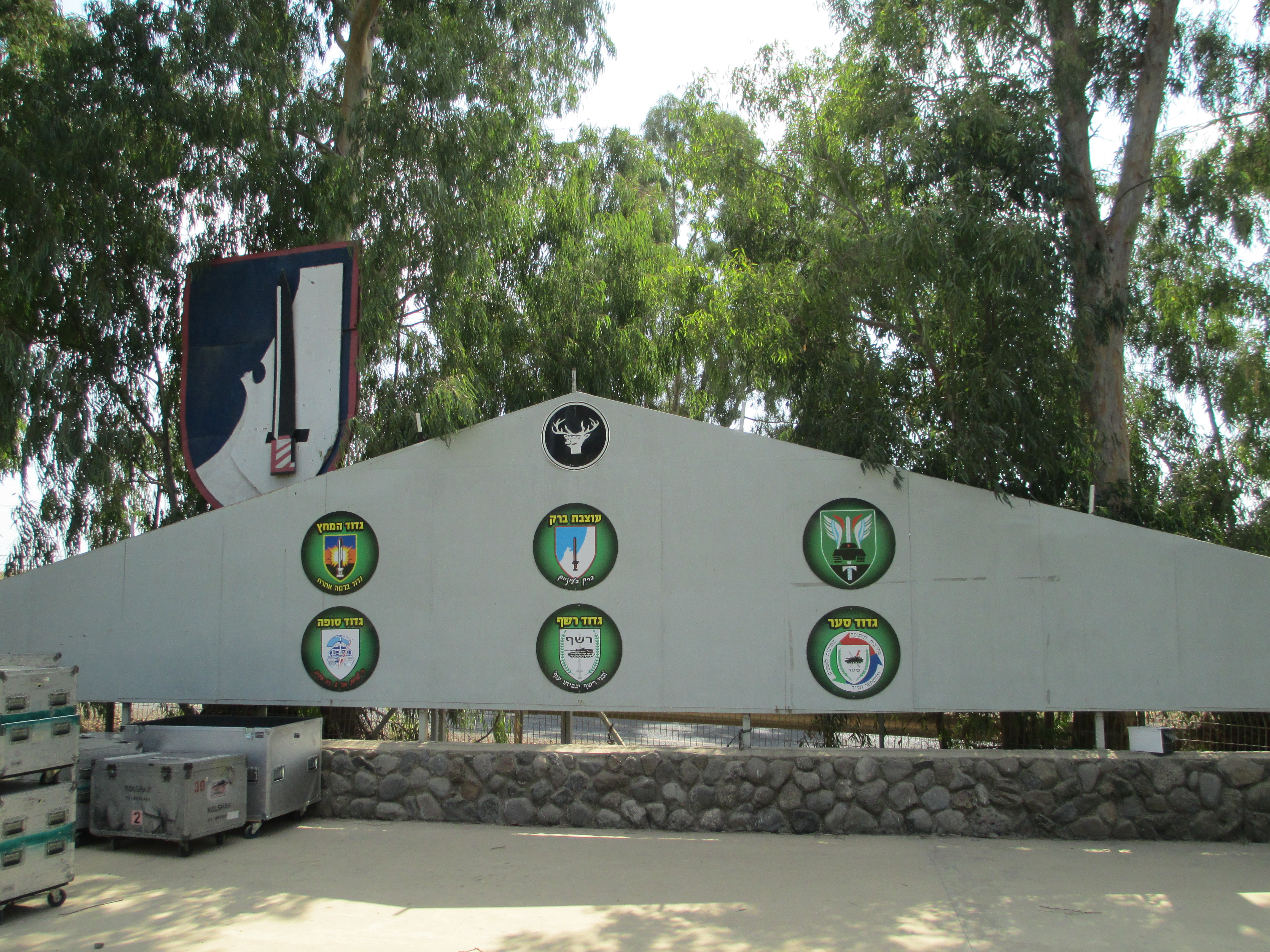 אתר הזיכרון המרכזי של חטיבת ברק (188) במחנה עלייקה ברמת הגולן